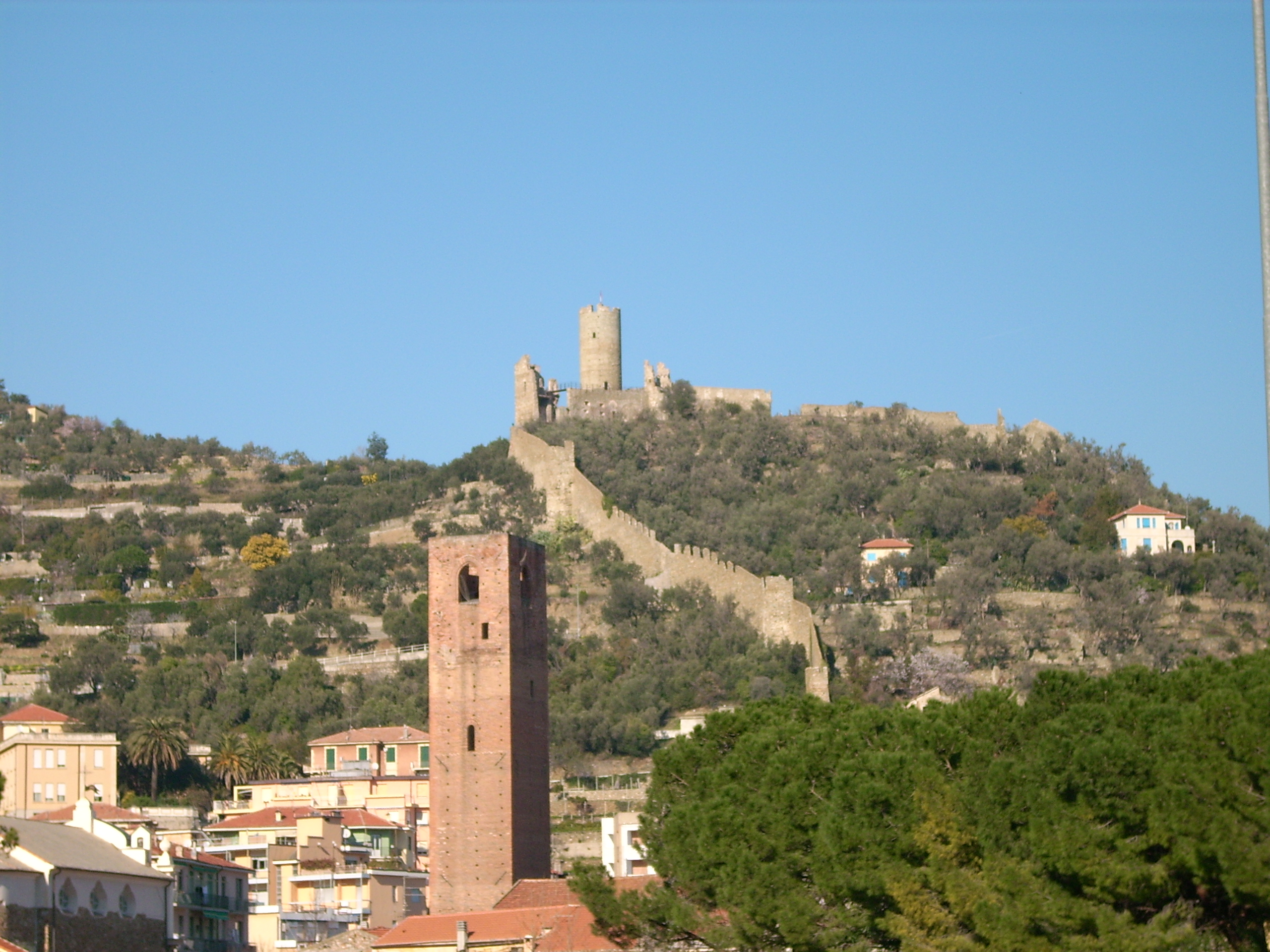 Castello e cinta muraria di Noli, Liguria, Italy